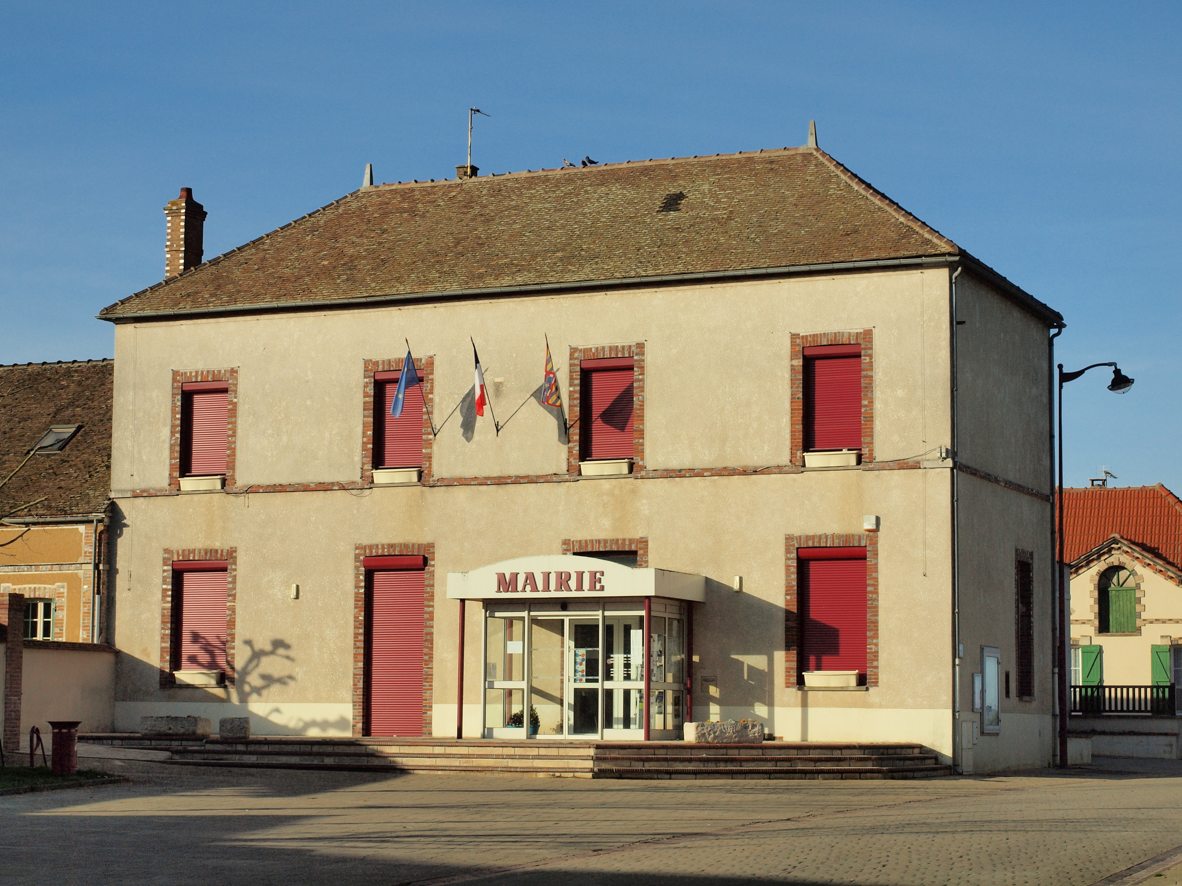 Mairie de Gron (Yonne, France)